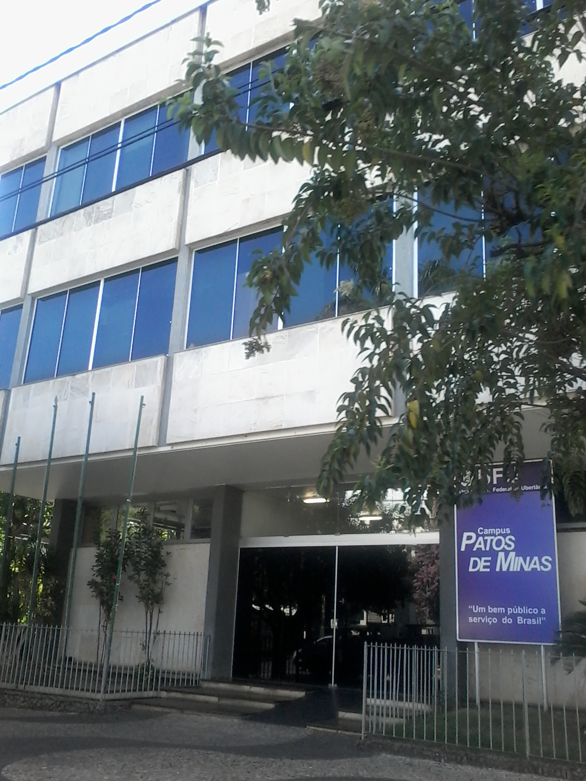 Palácio Dona Filomena, antigo Palácio dos Cristais, onde funcionou a Prefeitura de Patos de Minas, e atualmente sede da Universidade Federal de Uberlândia (UFU) na cidade.